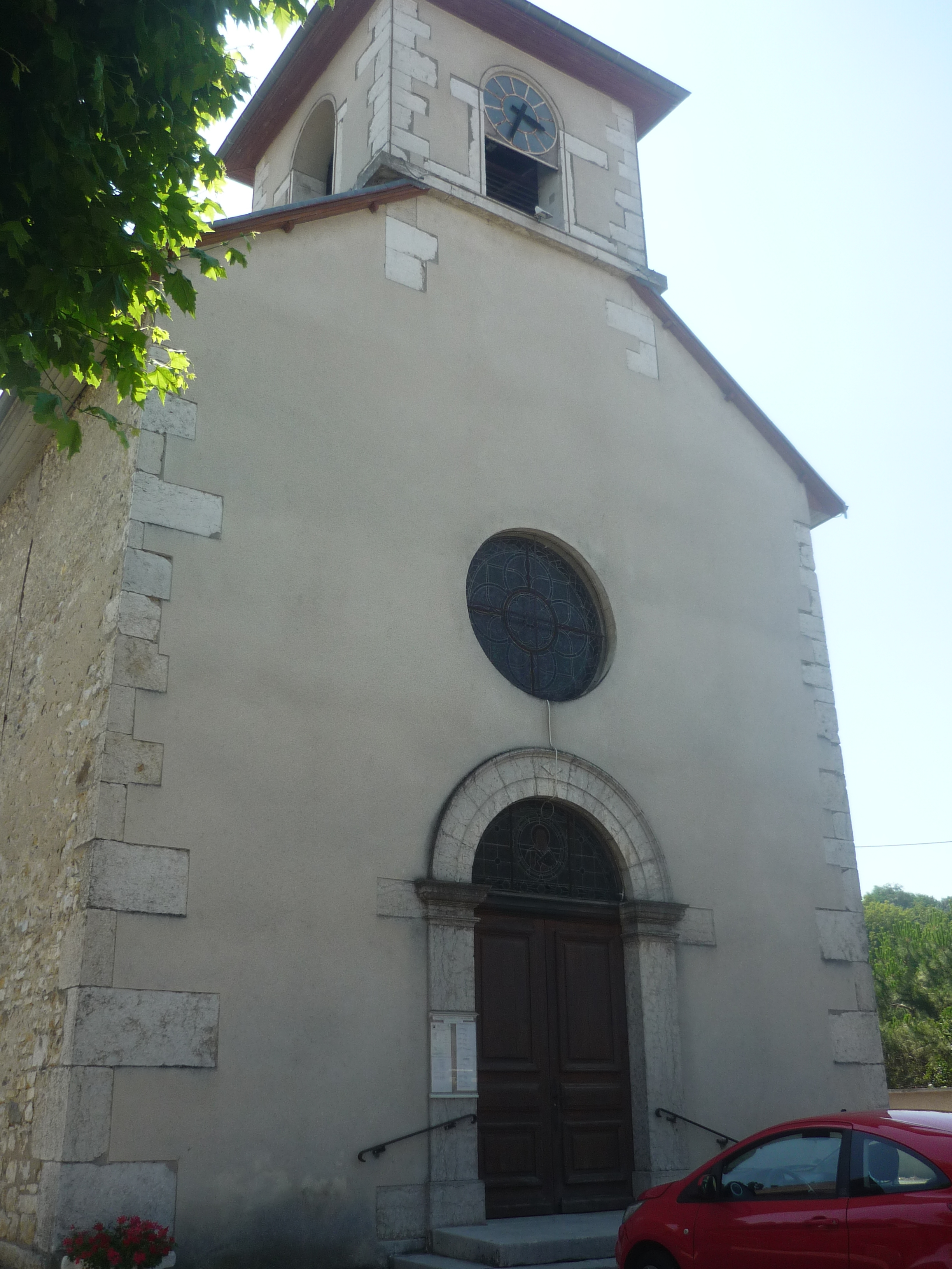 Église du village de Veyrins, sur la commune de Veyrins-Thuellin dans le département de l'Isère